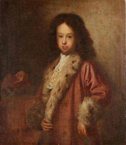 Ritratto Giuseppe Clemente di Baviera (recente attribuzione)